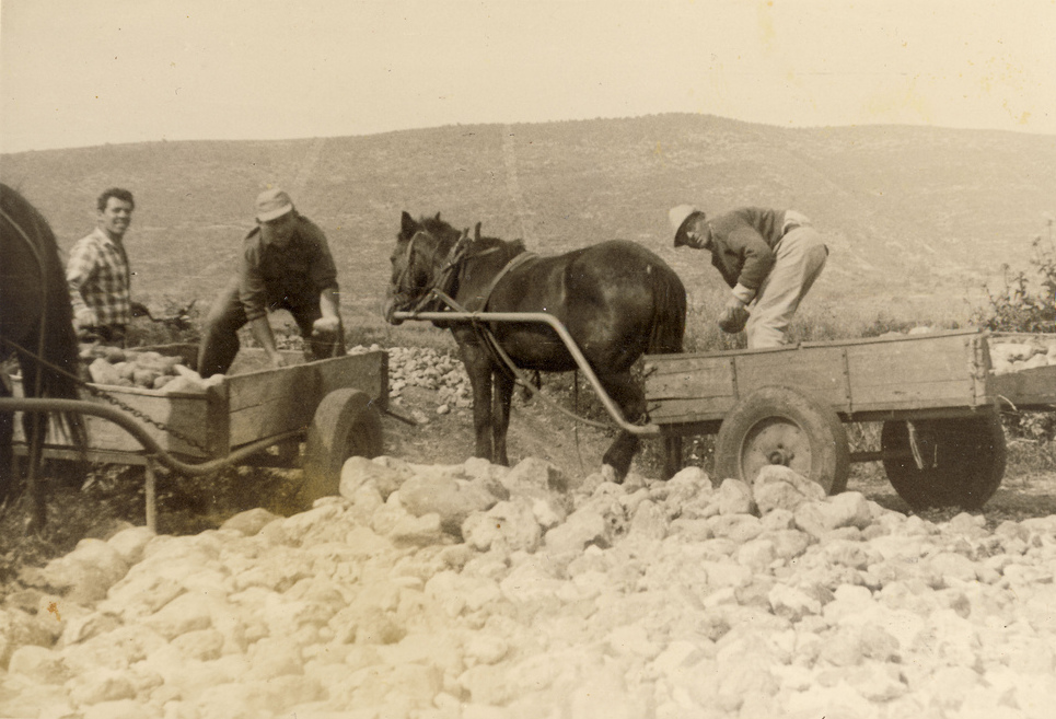 סלילת הדרכים על ידי המתיישבים, שנות ה-50